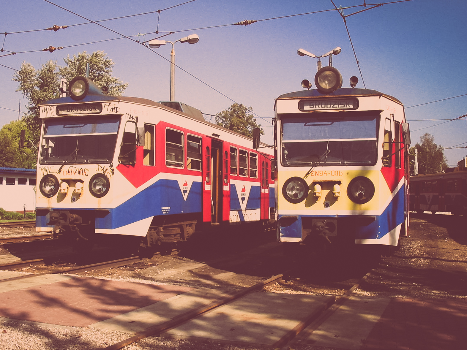 Elektryczne zespoły trakcyjne EN94-16 i EN94-08 stoją na terenie zaplecza technicznego Warszawskiej Kolei Dojazdowej zlokalizowanym przy stacji Grodzisk Mazowiecki Radońska.